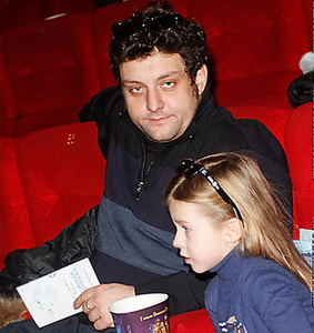 Михаил Полицеймако с дочкой на премьере мультфильма «Снежная Королева» 23 декабря 2012 года.